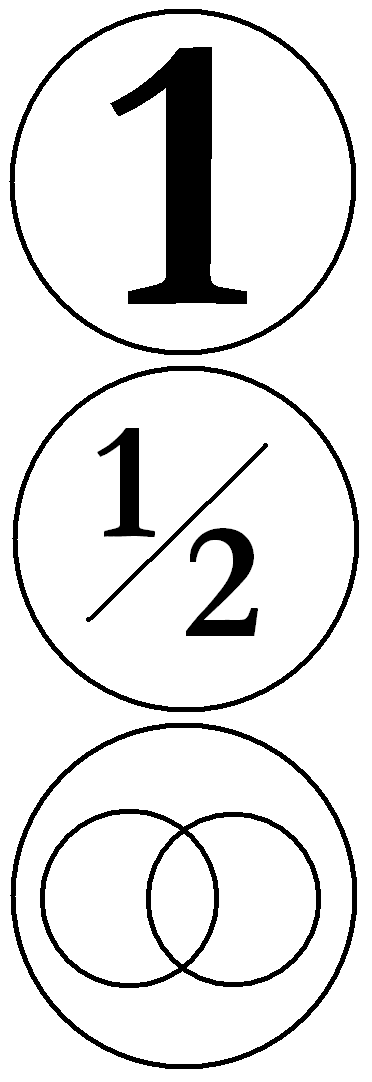 Markeringen voor verschillende types klimtouwen